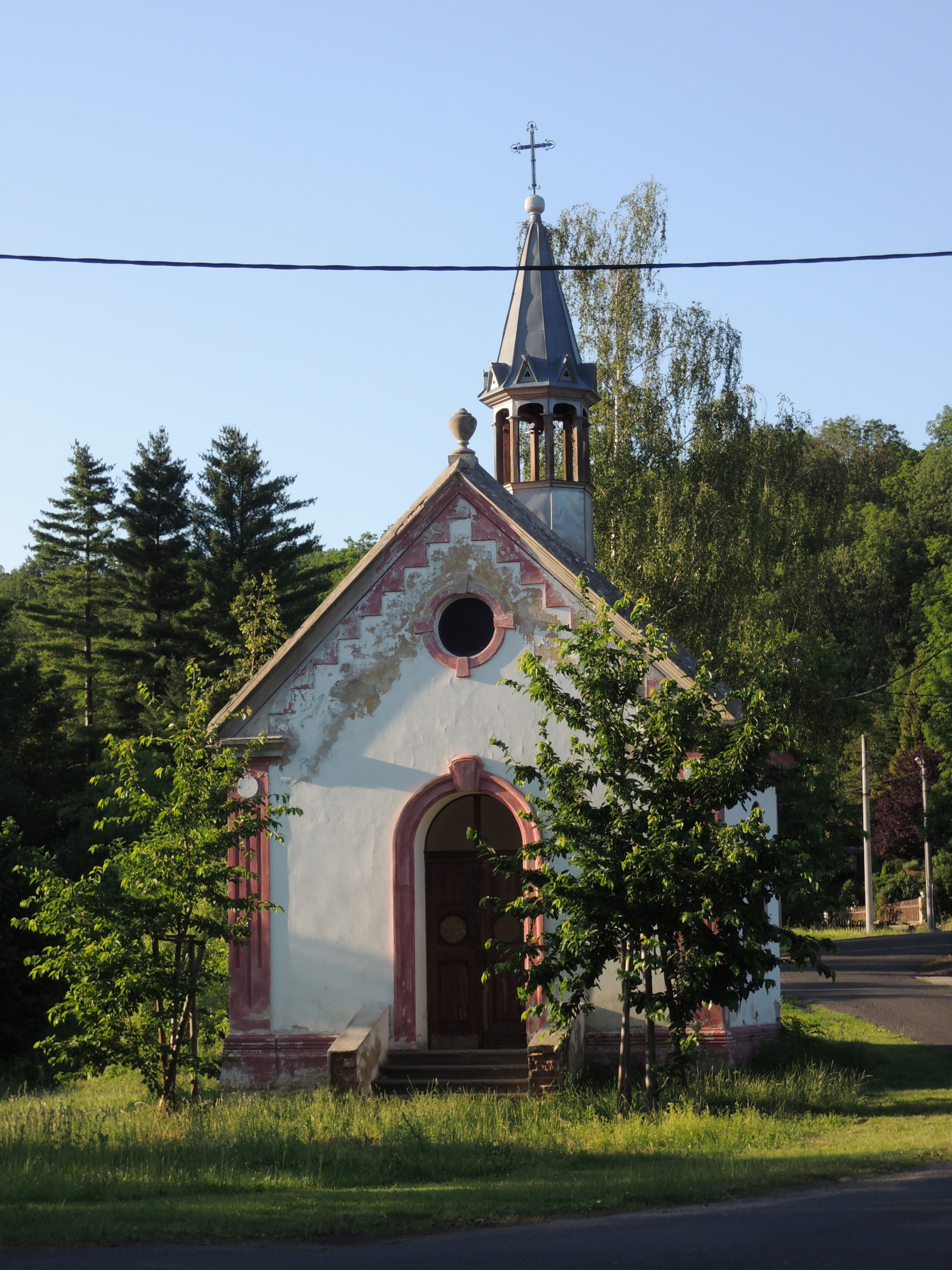 Kaple v Božtěšicích